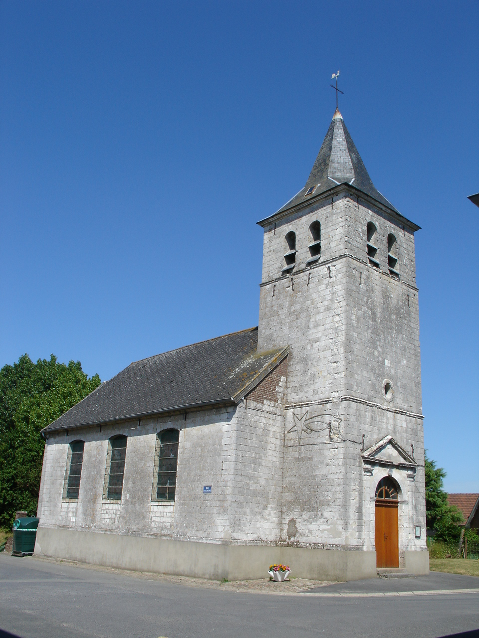 Église de La Herlière